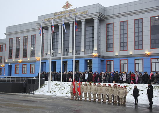 Филиал Нахимовского военно-морского училища «Нахимовское военно-морское училище Министерства обороны Российской Федерации» в г. Мурманск»